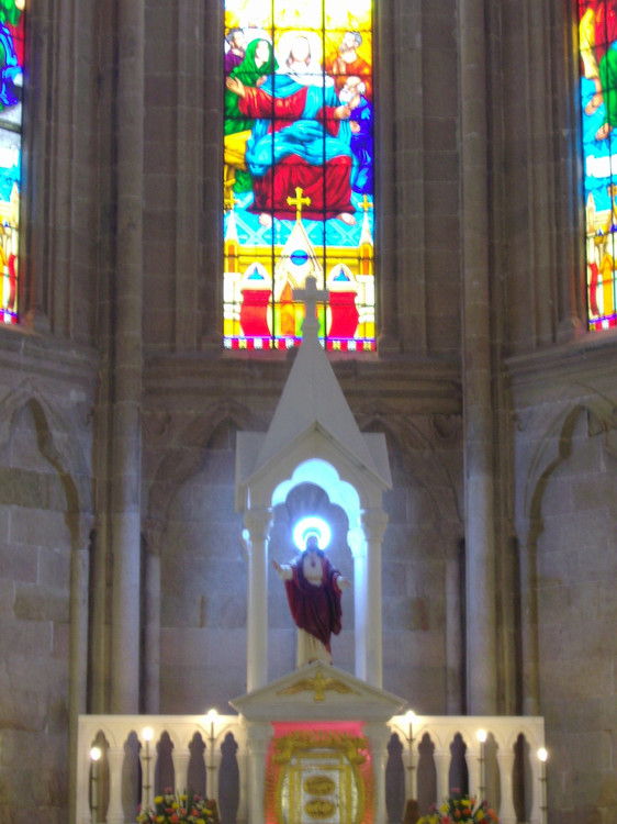 广州石室教堂内的耶稣像